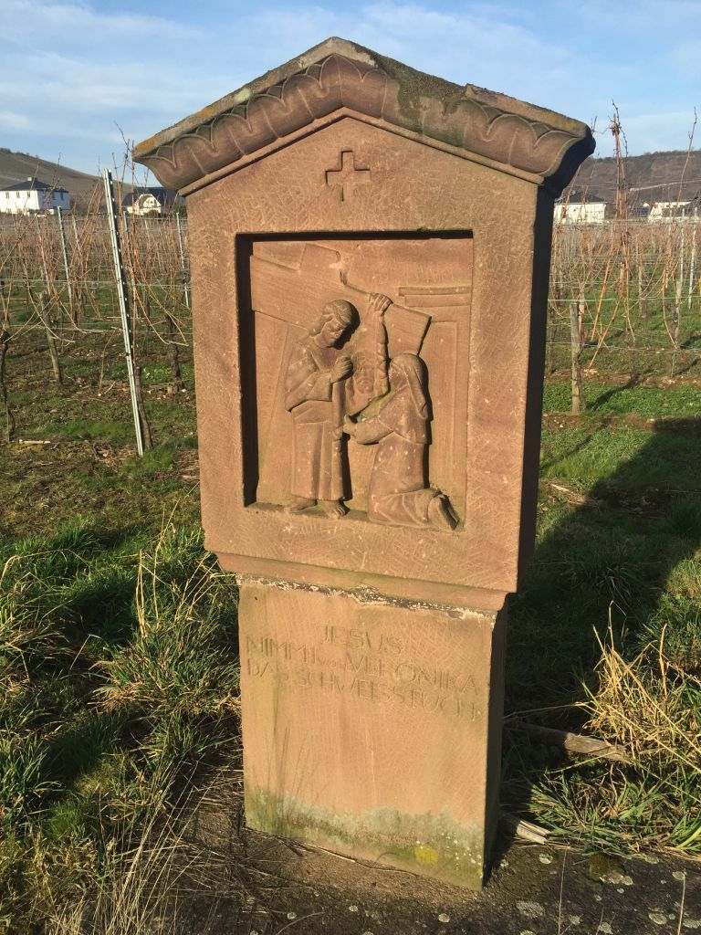 Kreuzweg Trittenheim - Station 6 von 14